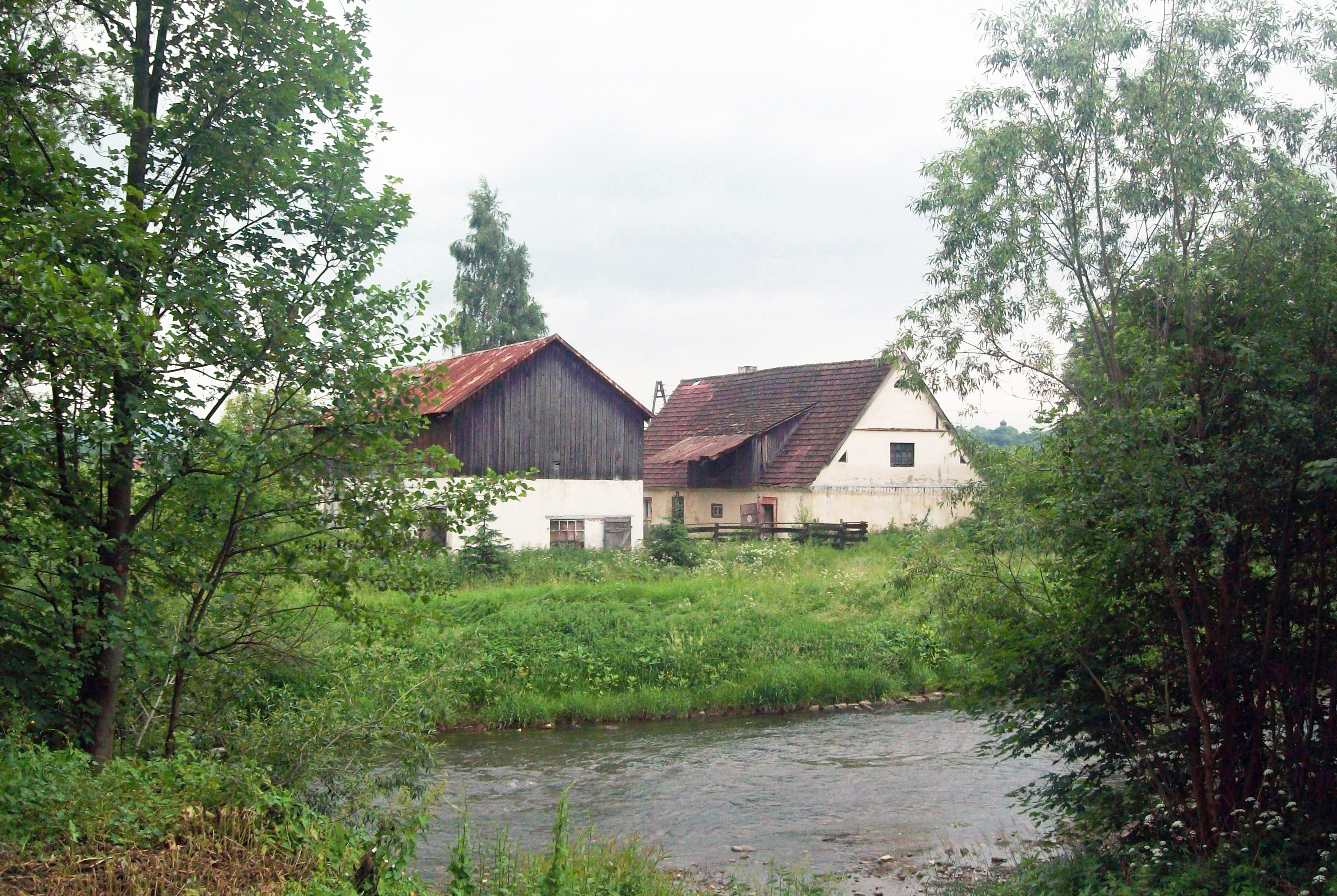 Pilcz - osada będąca częścią Krosnowic